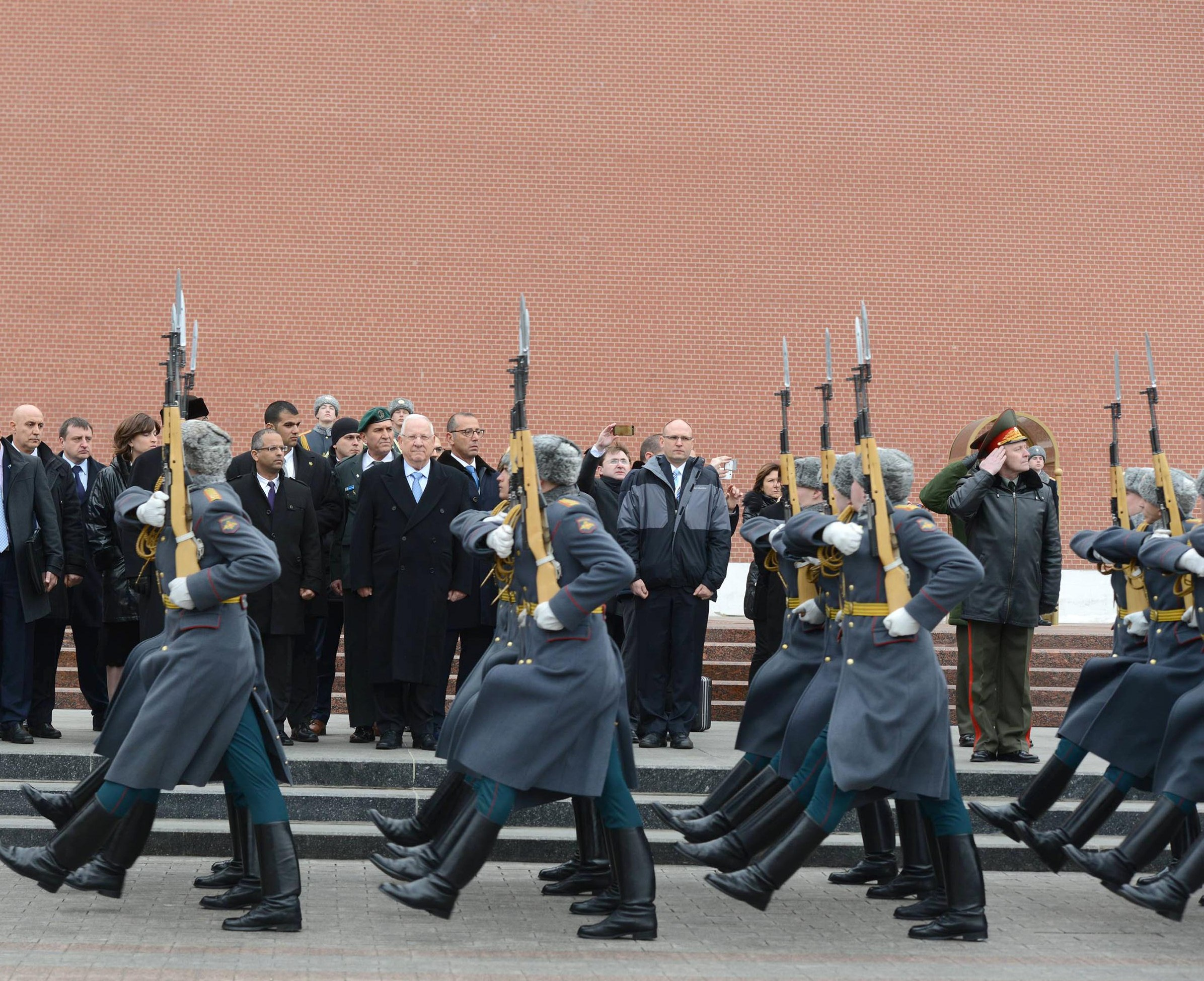 נשיא מדינת ישראל ראובן ריבלין בעת ביקור בקבר החייל האלמוני במוסקבה